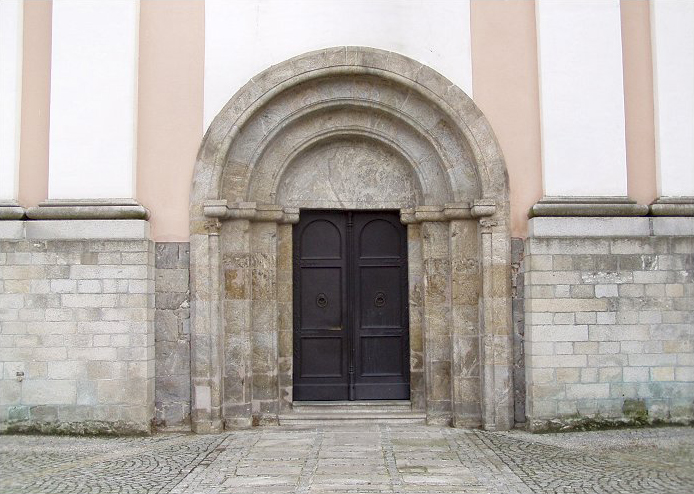 Romanisches Portal der Stiftskirche von Wilhering